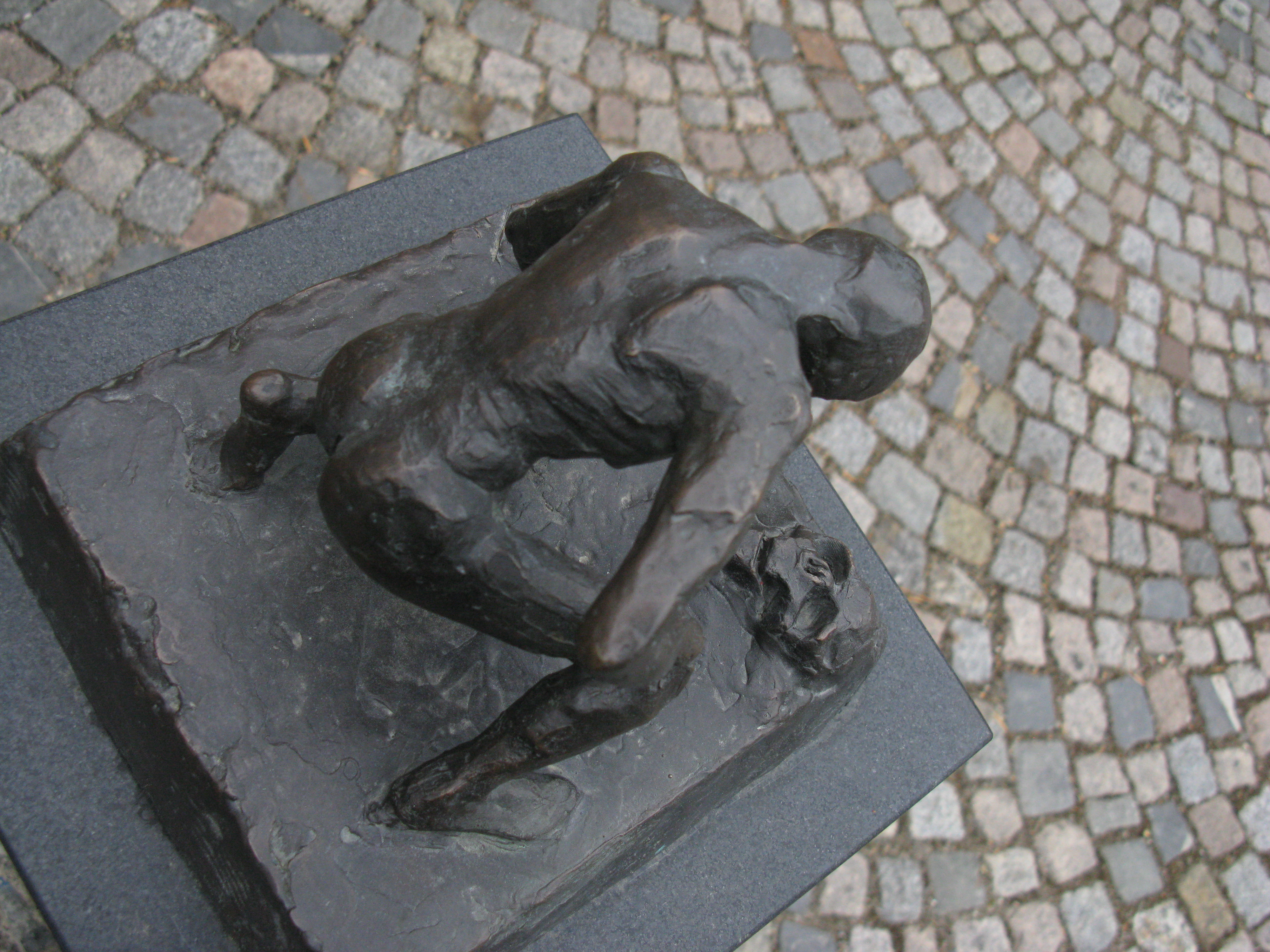 Skulptur Lothar Morlock vor dem ehemaligen KZ Wiesengrund bei Vaihingen an der Enz